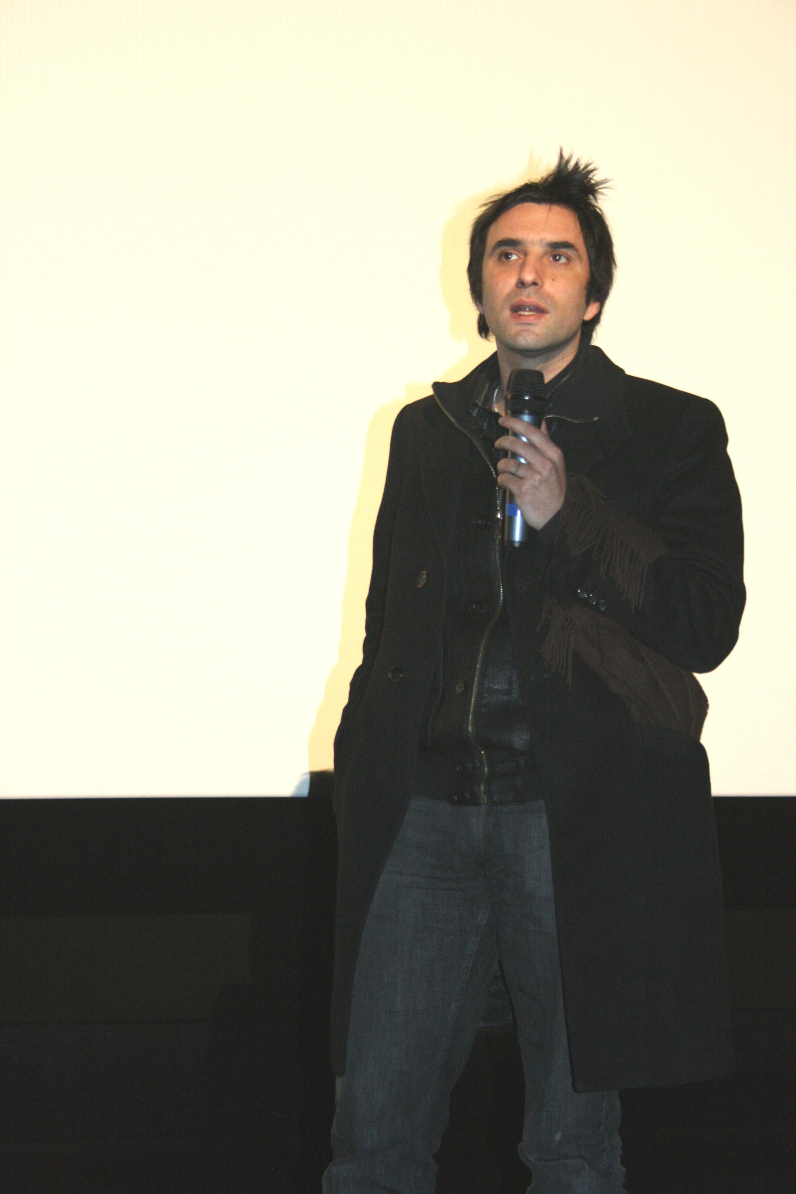 Samuel Benchetrit à l'avant-première de J'ai toujours rêvé d'être un gangster diffusée à l'UGC Ciné Cité Bercy, à Paris.